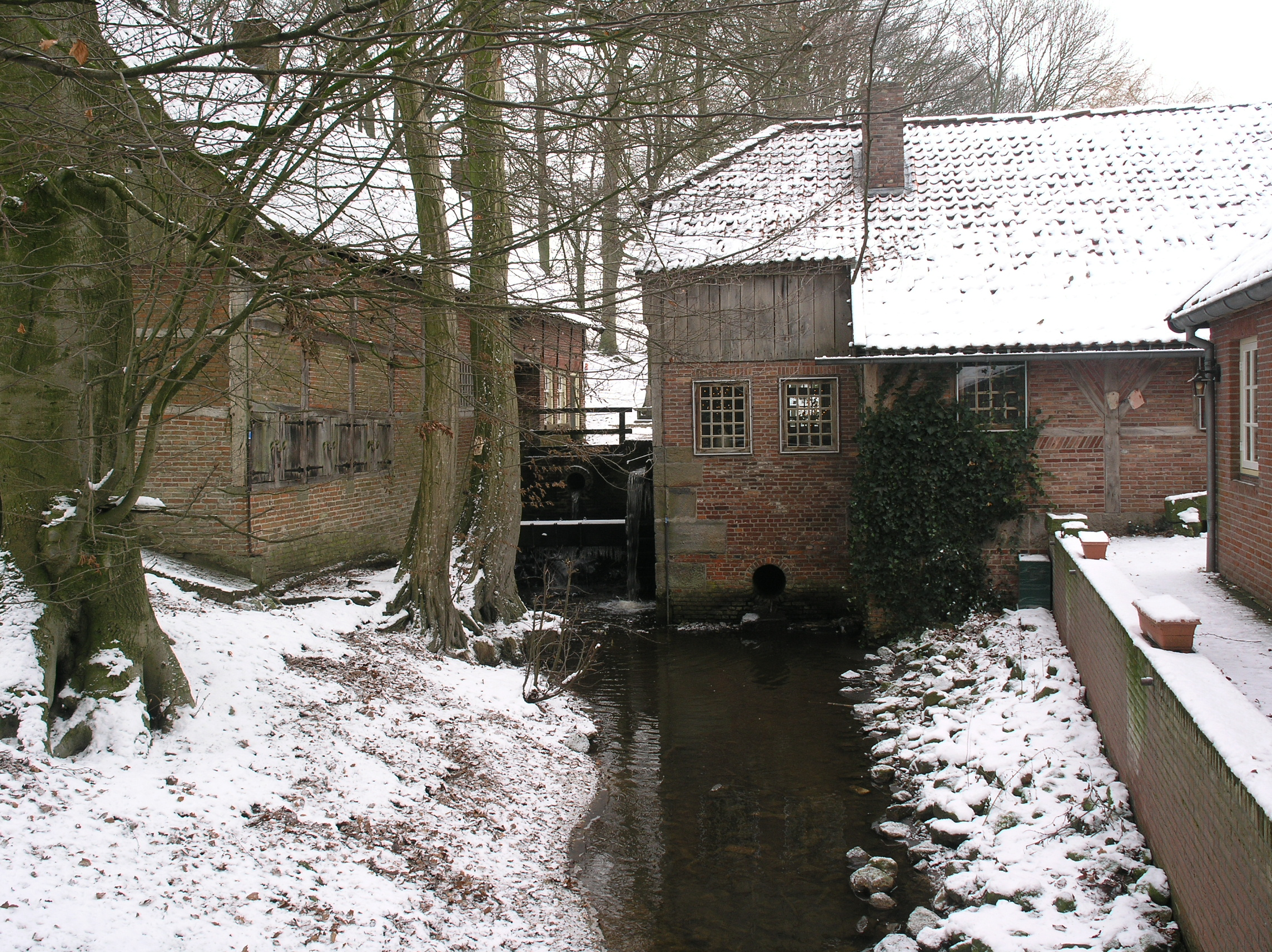 Mander Molen van Bels